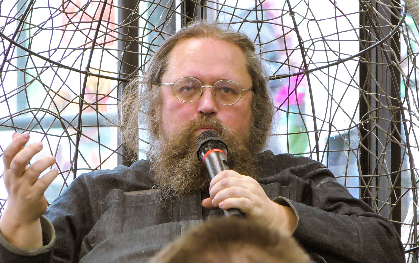 Андрей Кураев в Московском Доме Книги 13.06.2017.